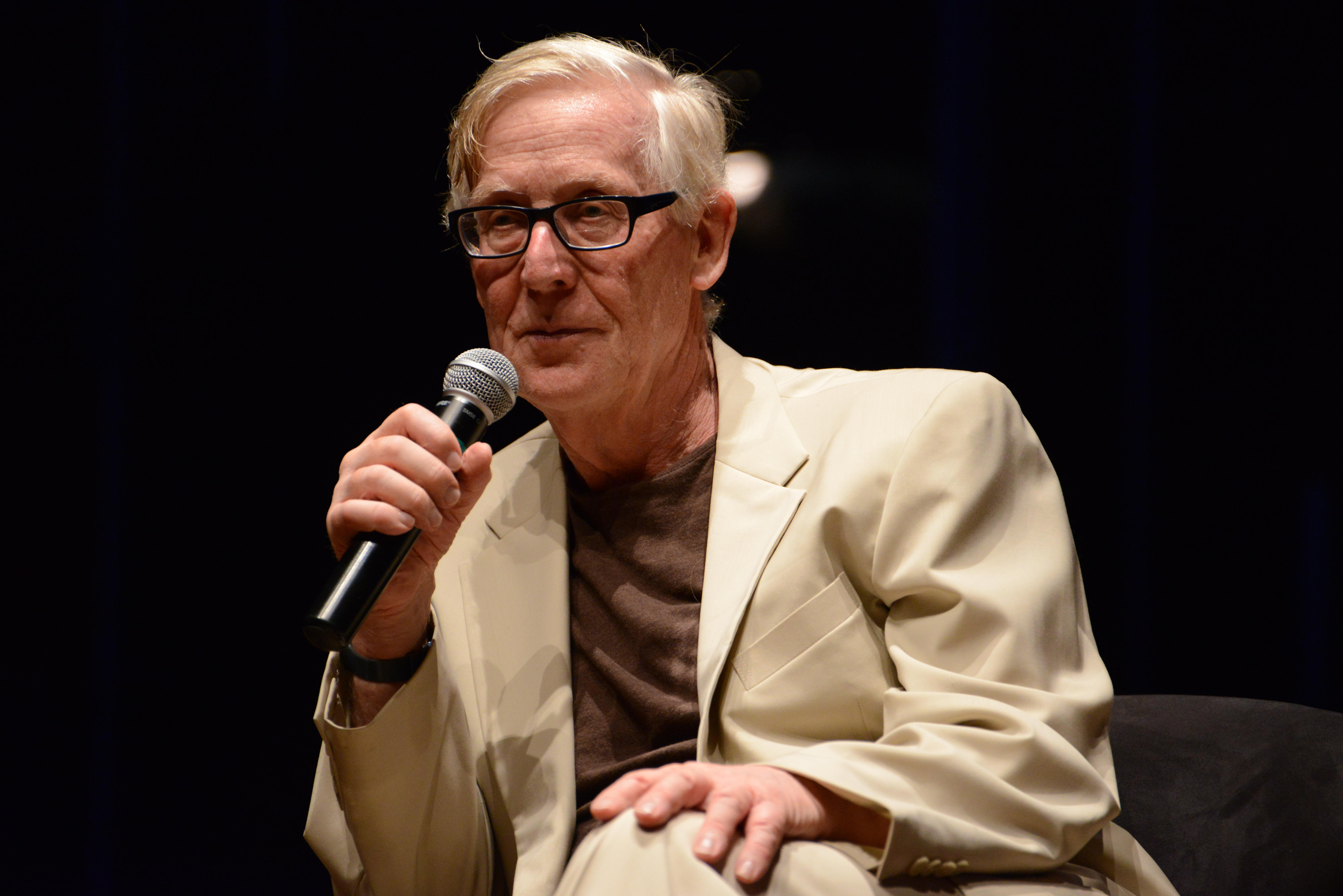 British historian Perry Anderson at Fronteiras do Pensamento Porto Alegre 2013